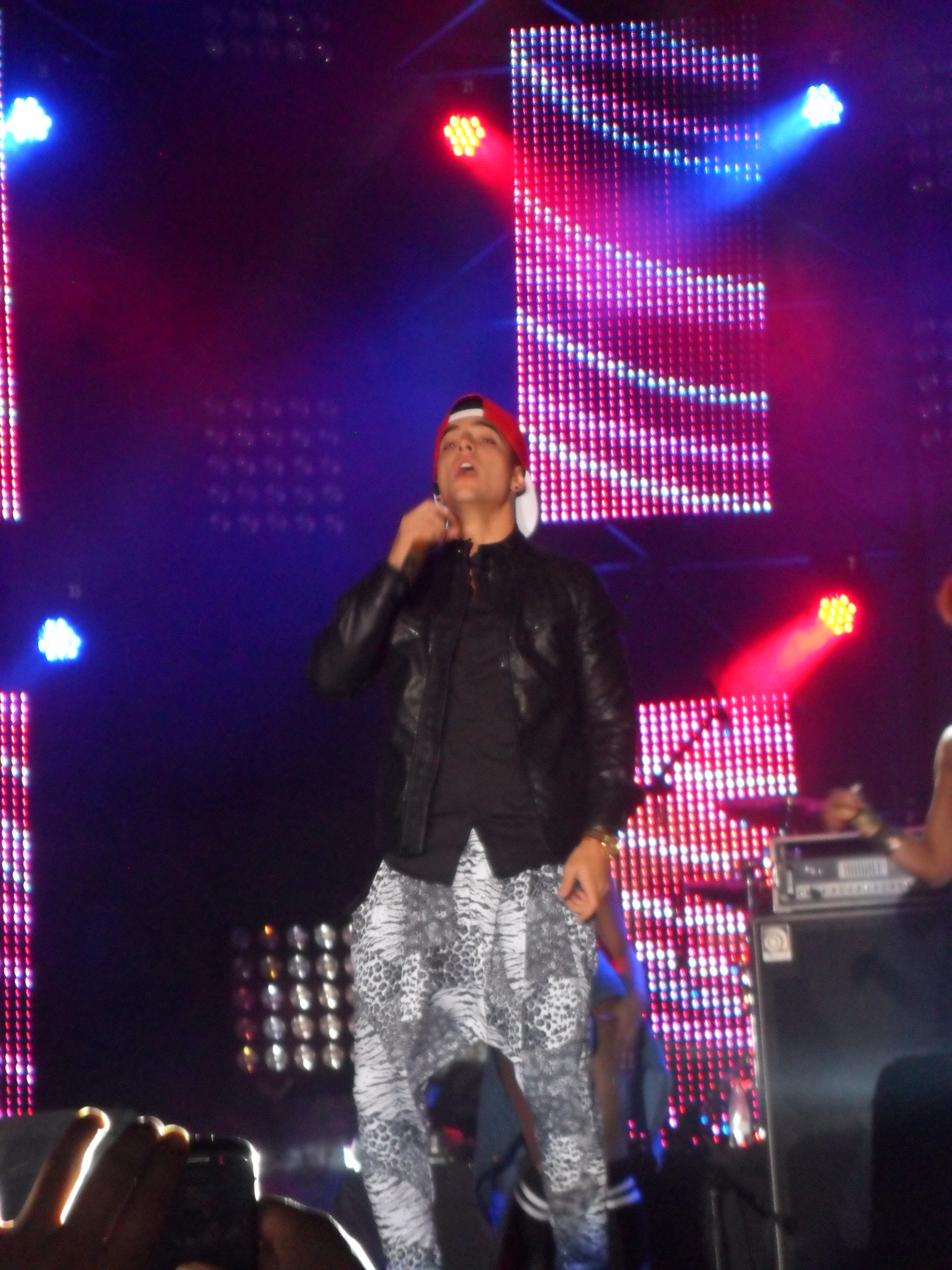 Maluma en vivo.